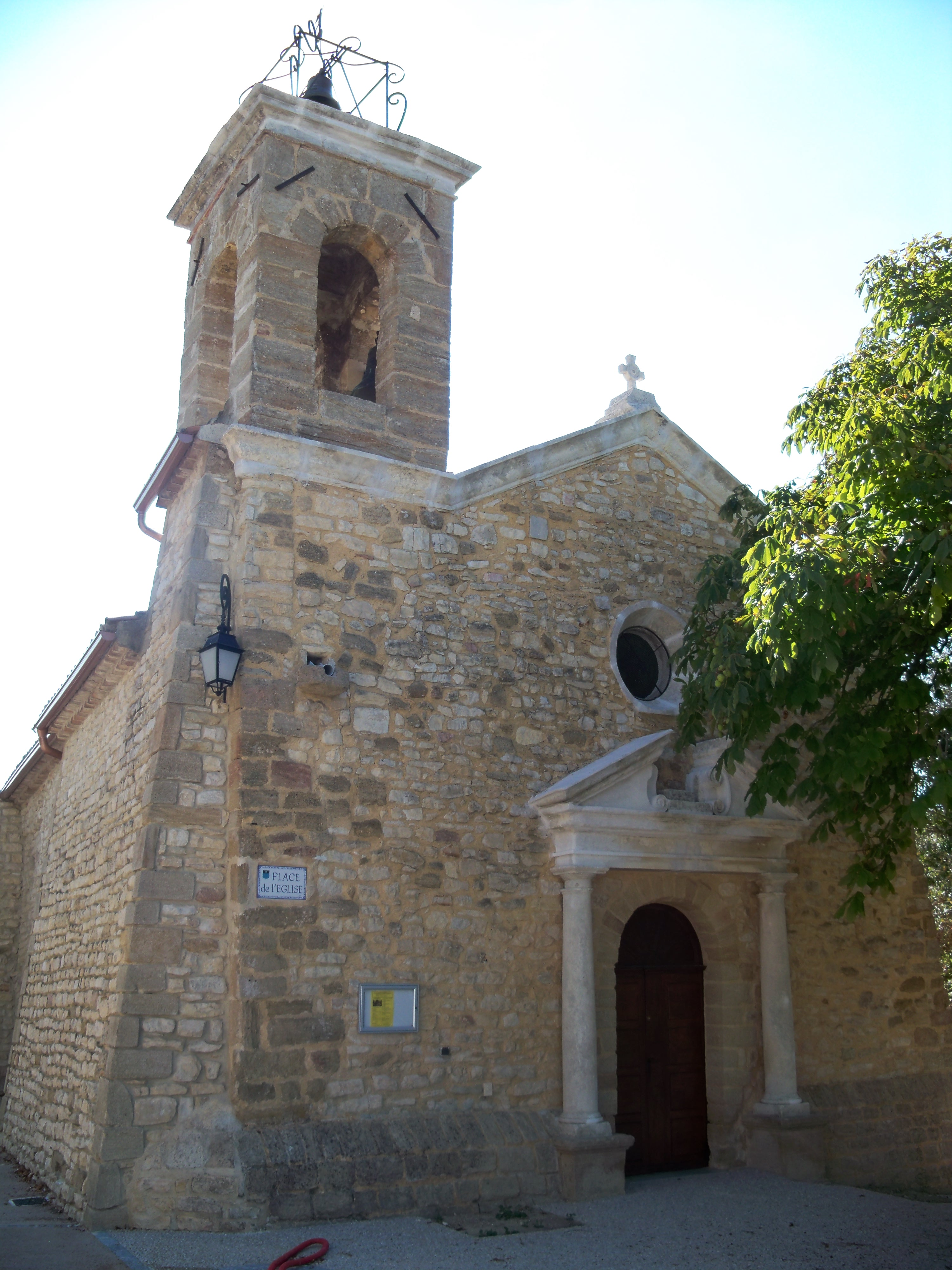 église de Lagarde Paréol, Vaucluse, France